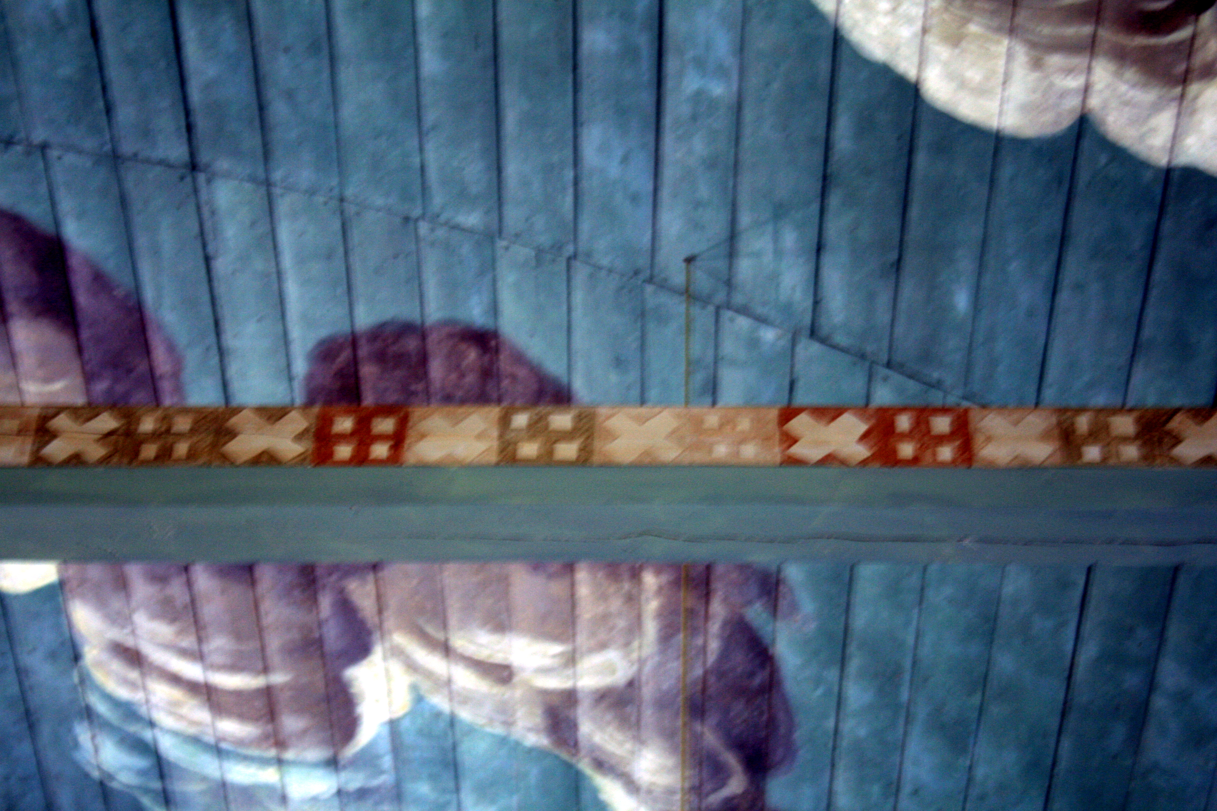 Ausmalung des Tonnengewölbes der Rimberti-Kirche in Emmelsbüll